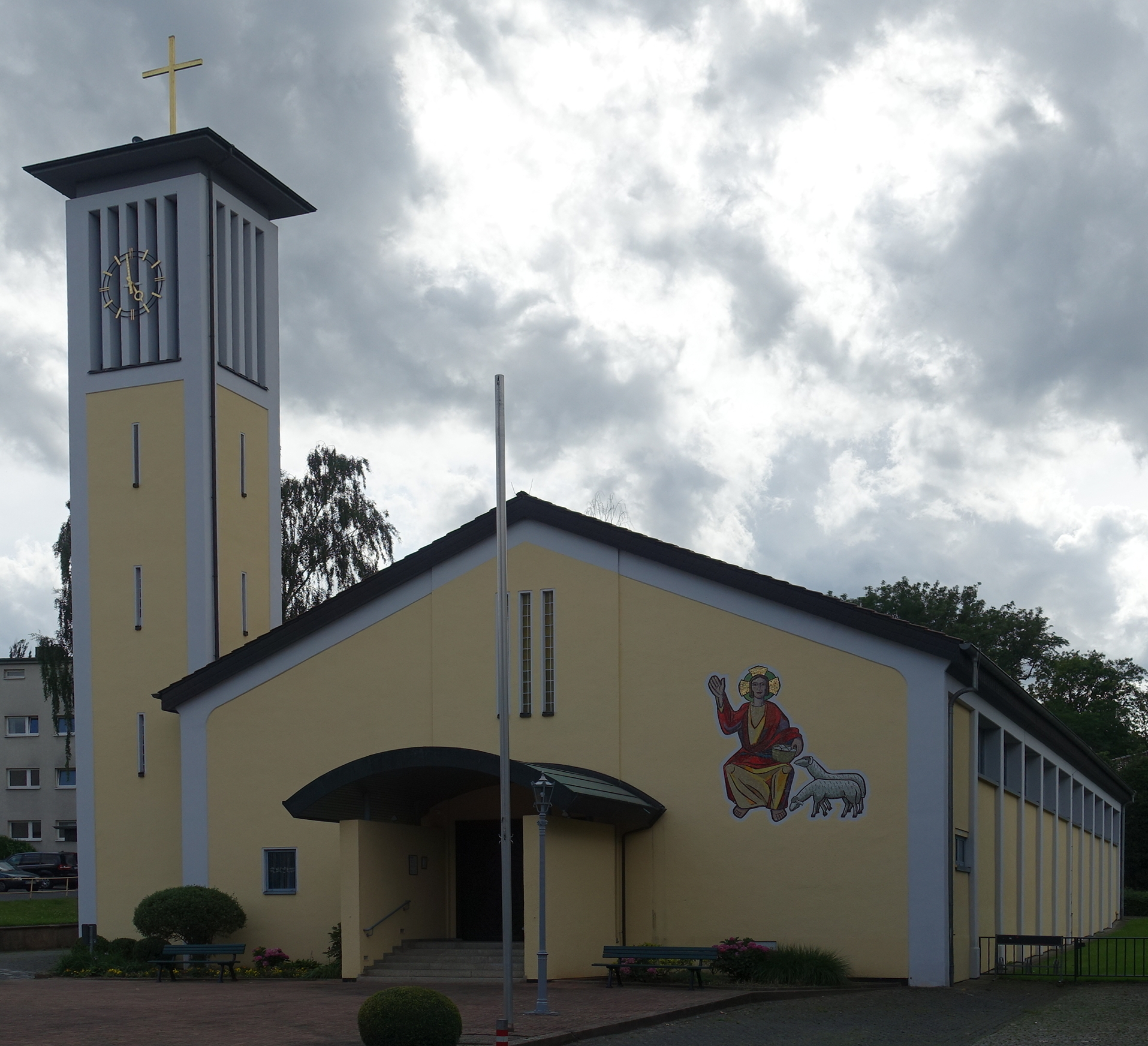 Blick von der Straße auf die Kirche